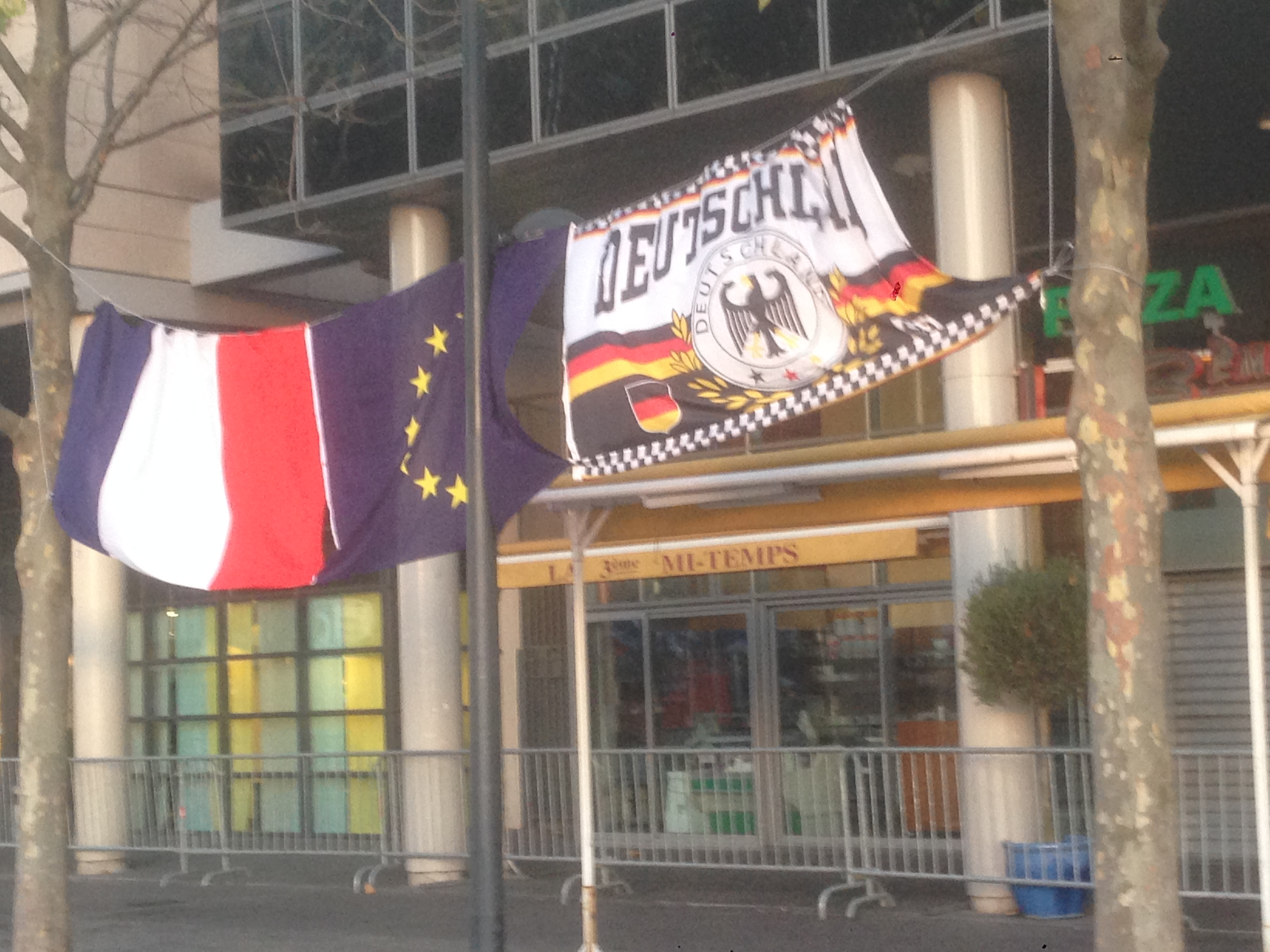 Drapeaux accrochés rue Jules-Rimet à Saint-Denis le long du Stade de France, après le match amical France-Allemagne du 13 novembre 2015